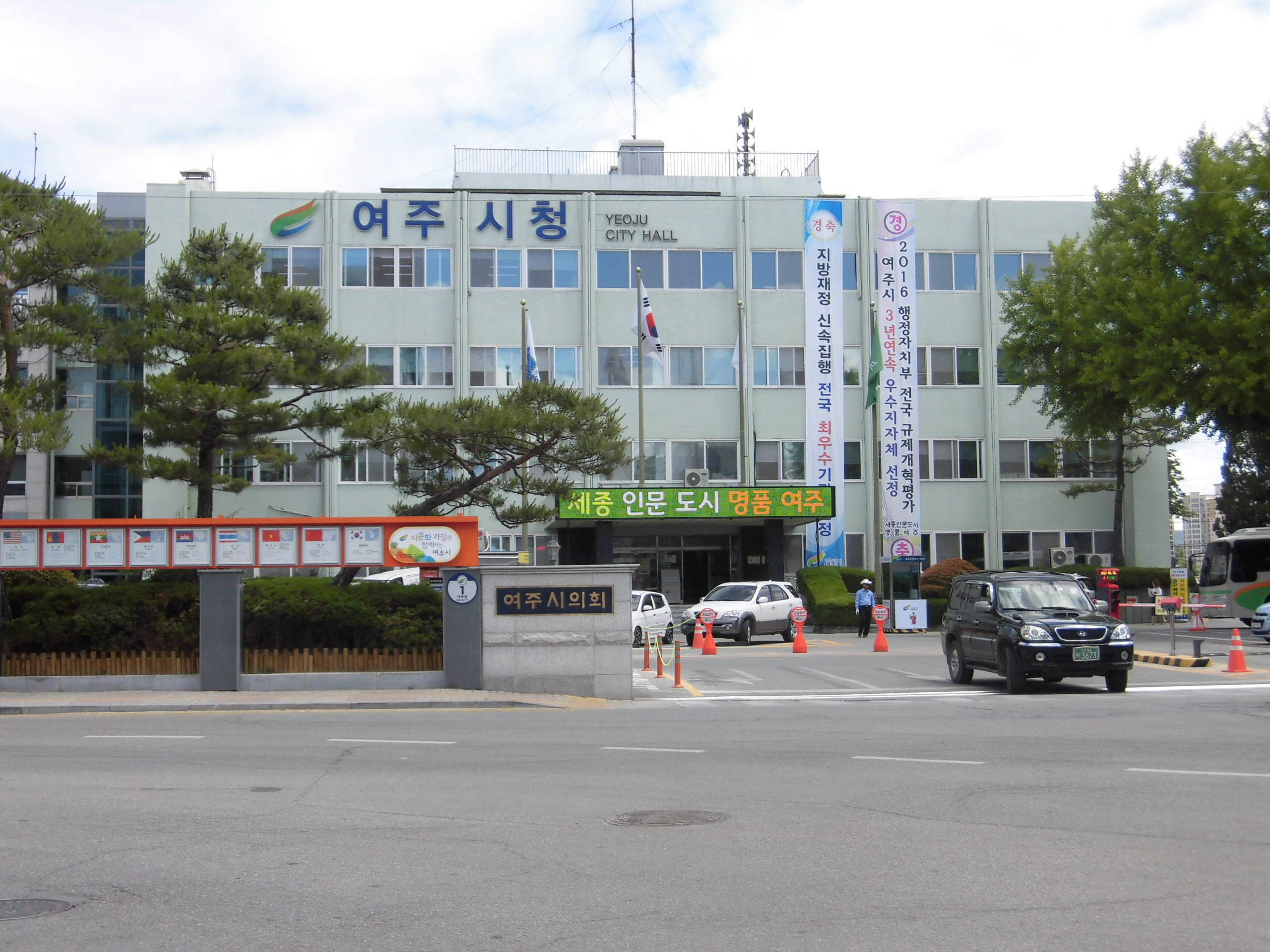 경기도 여주시에 있는 여주시청